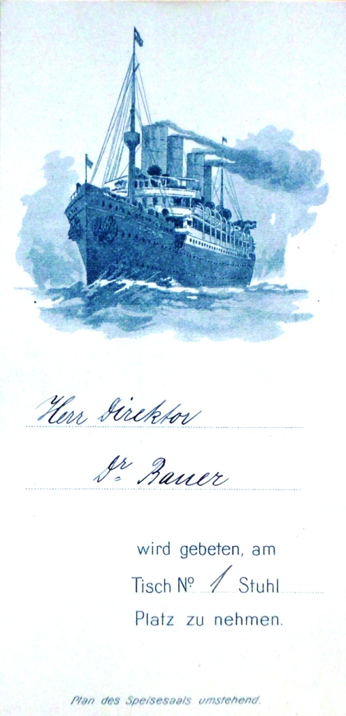 Einladung zur Probefahrt der Deutschland